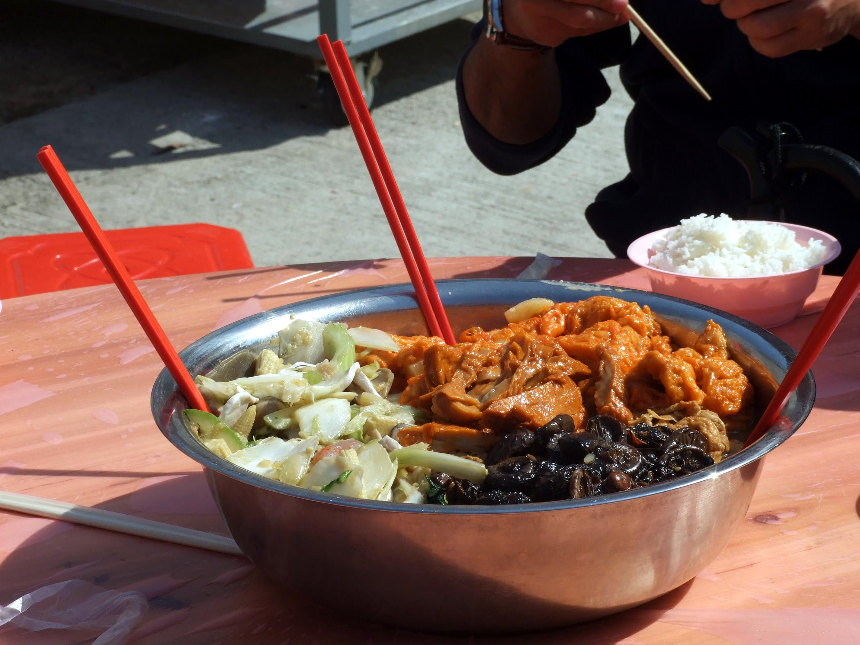 中文（香港）: 2010年泰亨鄉十年一屆的太平清醮免費供應的素盆菜